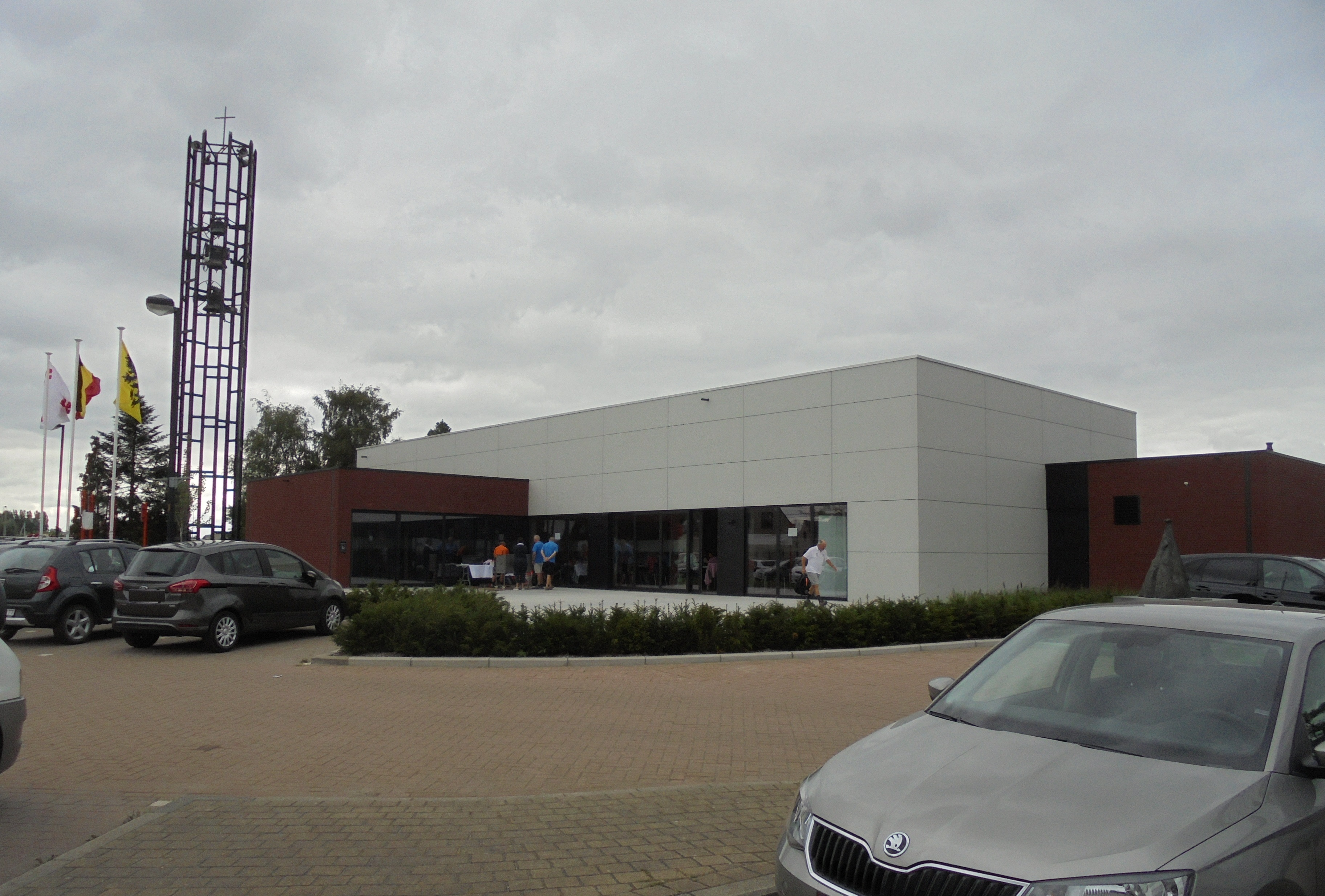 Het OC De Tassche - staat op de plaats van de voormalige en afgebrande Parochiekerk Onze-Lieve-Vrouw Onbevlekt Ontvangen - Roeselarestraat - Ardooie - West-Vlaanderen - België